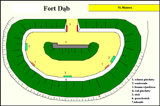 Schemat Fortu Dąb w Grudziądzu